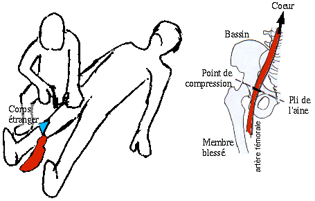 Point de compression fémoral (dans le pli de l'aine) : avec le poing fermé, comprimer l'artère fémorale contre le fémur